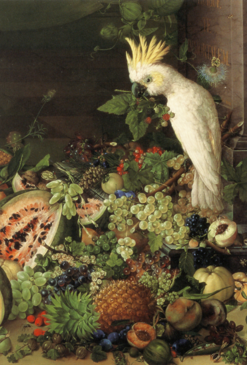 detail